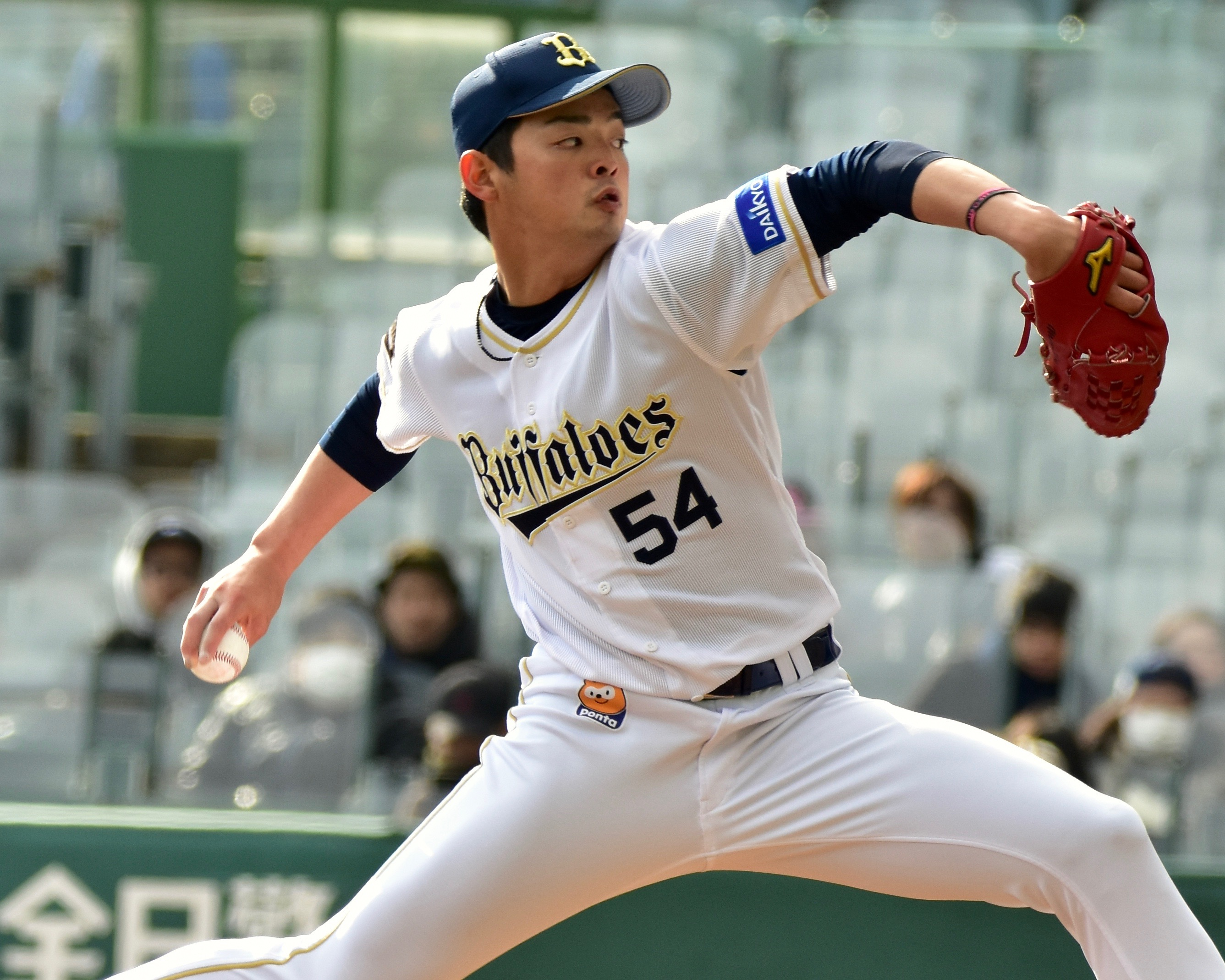 2017年3月8日、ほっともっとフィールド神戸にて